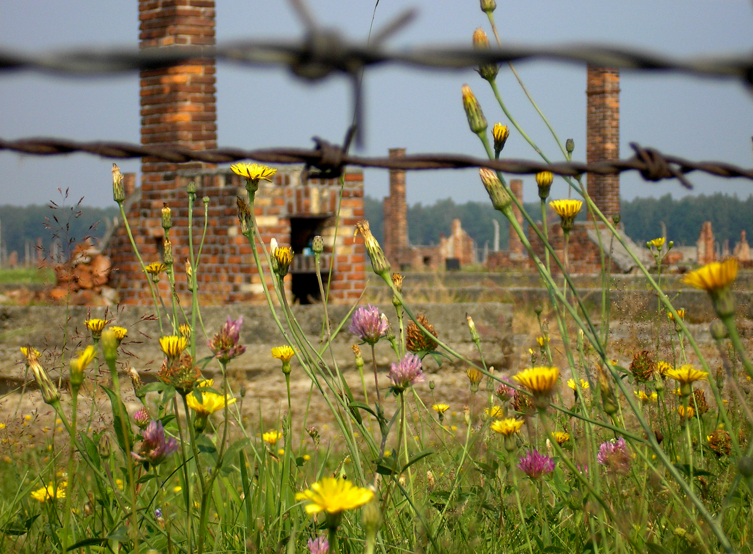 Auschwitz-Birkenau, im Vordergrund blühende Blumen, und im Hintergrund Schornsteine der abgebrannten Barracken